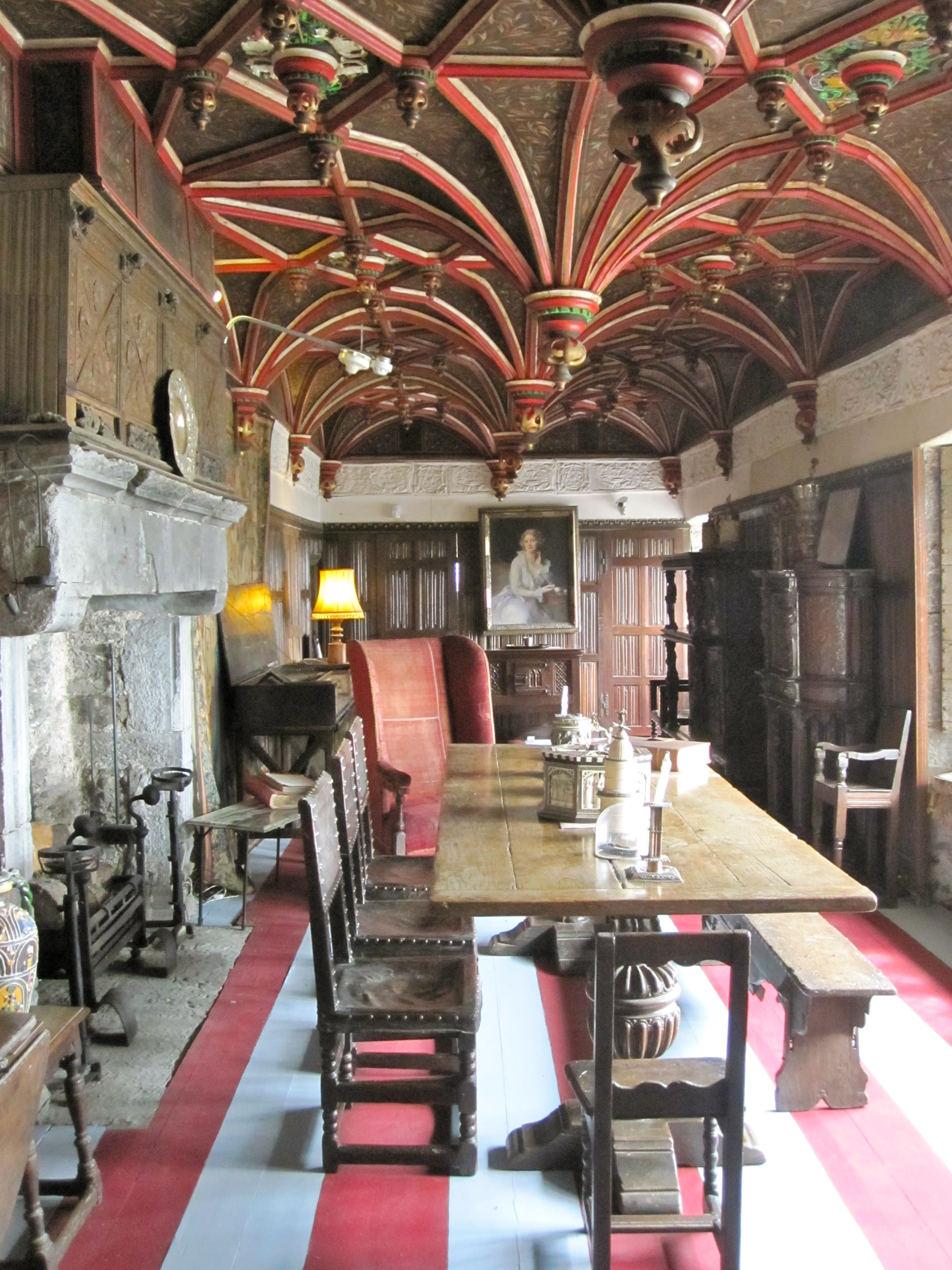 Zimmer im Bunratty Castle